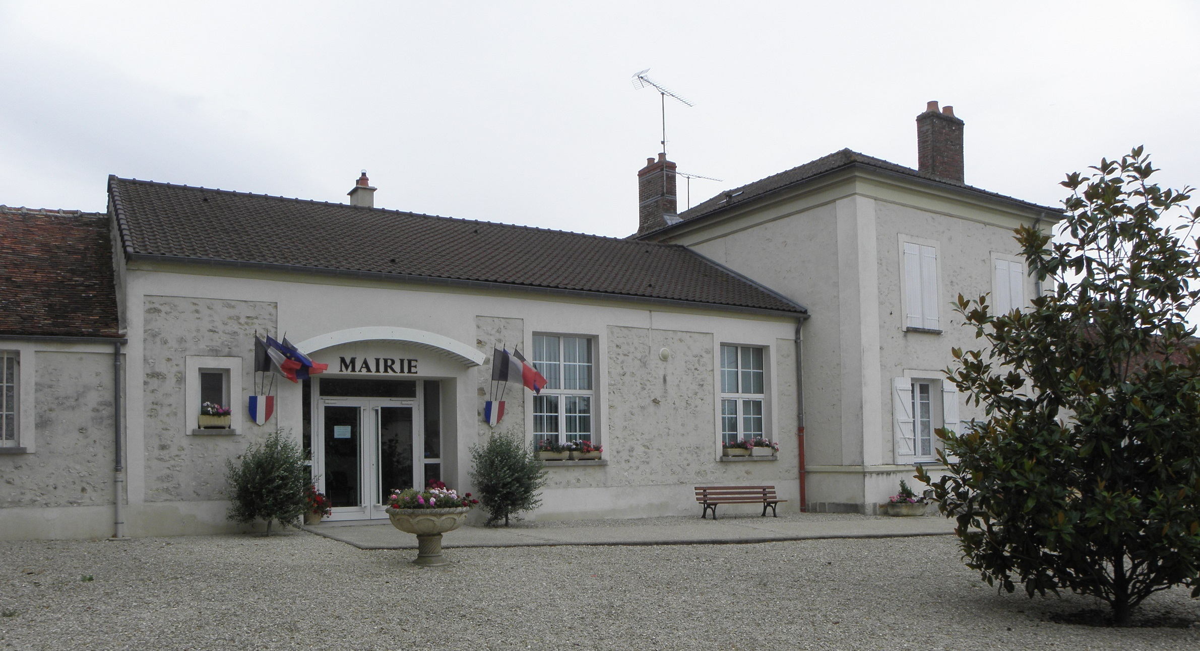 Mairie de Champcenest (77).